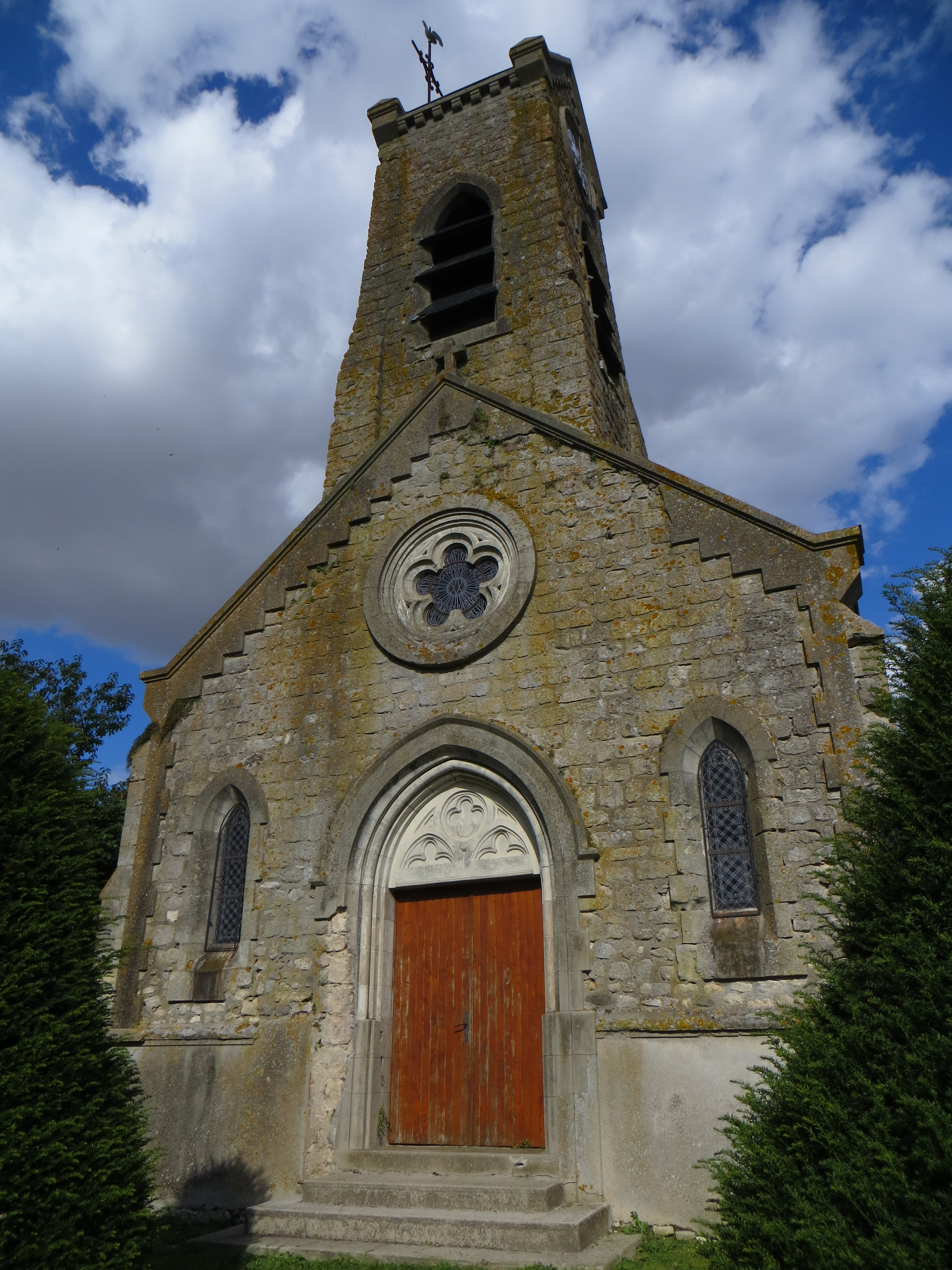 Vue générale de l'église